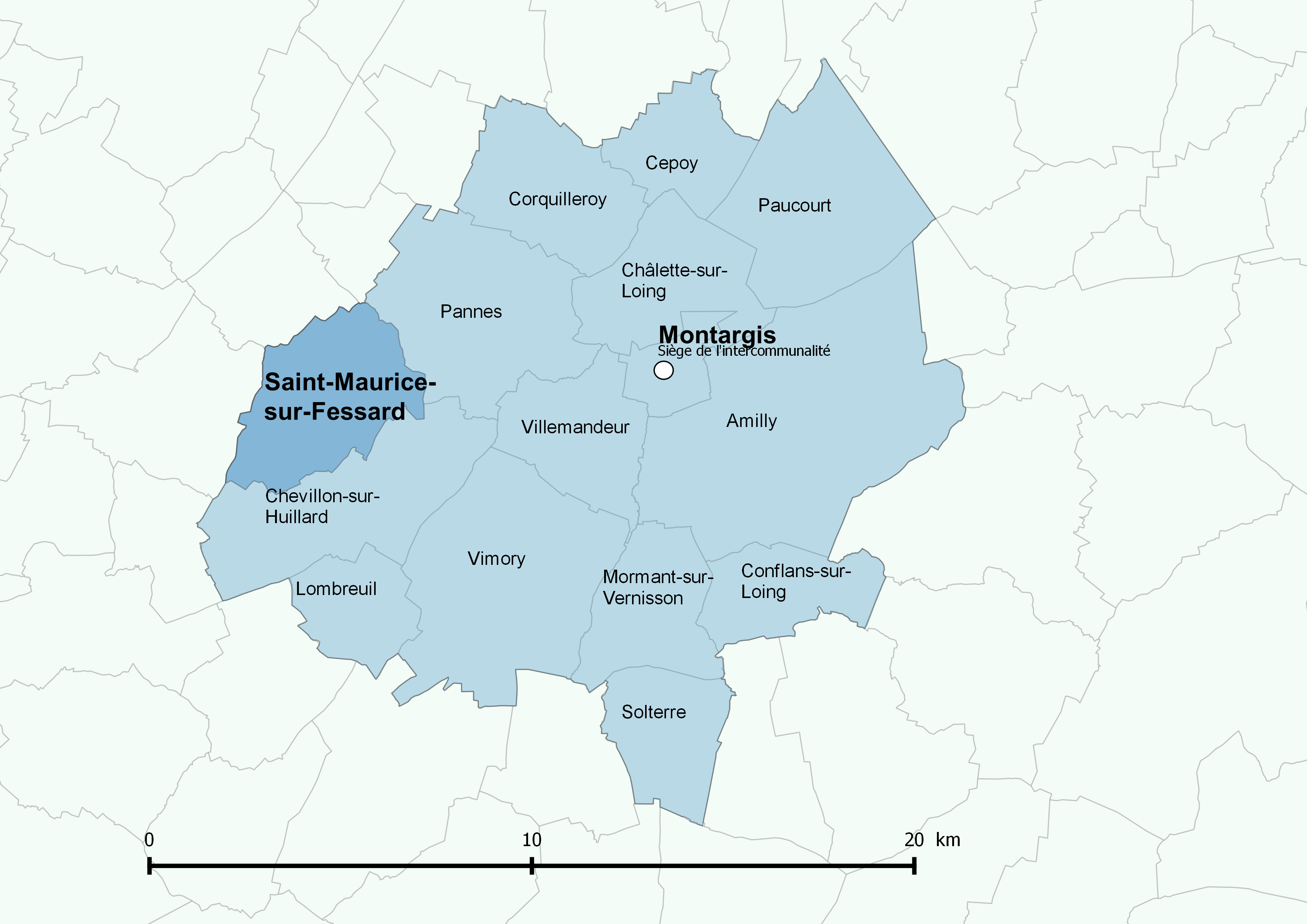 Périmètre de l'Agglomération montargoise et rives du Loing - Positionnement de la commune de Saint-Maurice-sur-Fessard